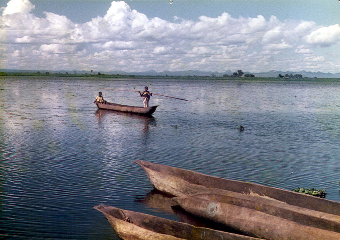 Ndindemarsch bei Nsanje - Malawi - Afrika